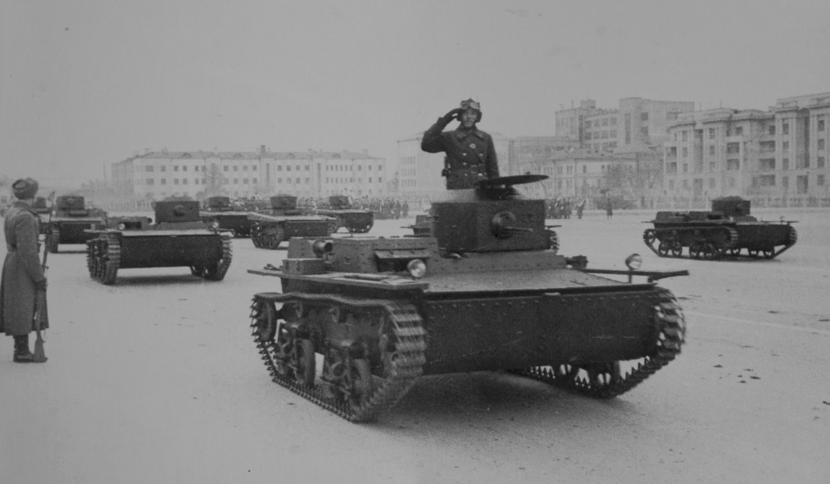 Малые танки-амфибии Т-38. Военный парад в Куйбышеве 7 ноября 1941 г.